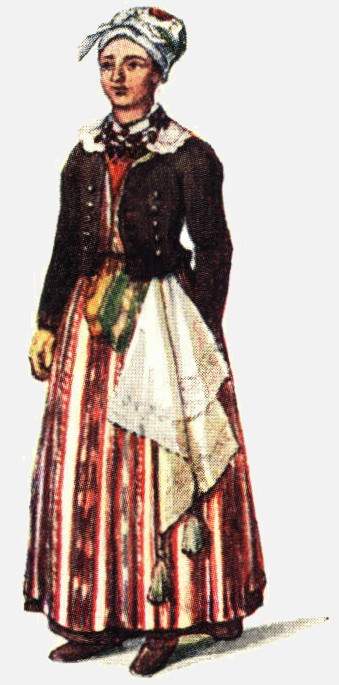 Folkdräkt från Östra härad (Bleking)